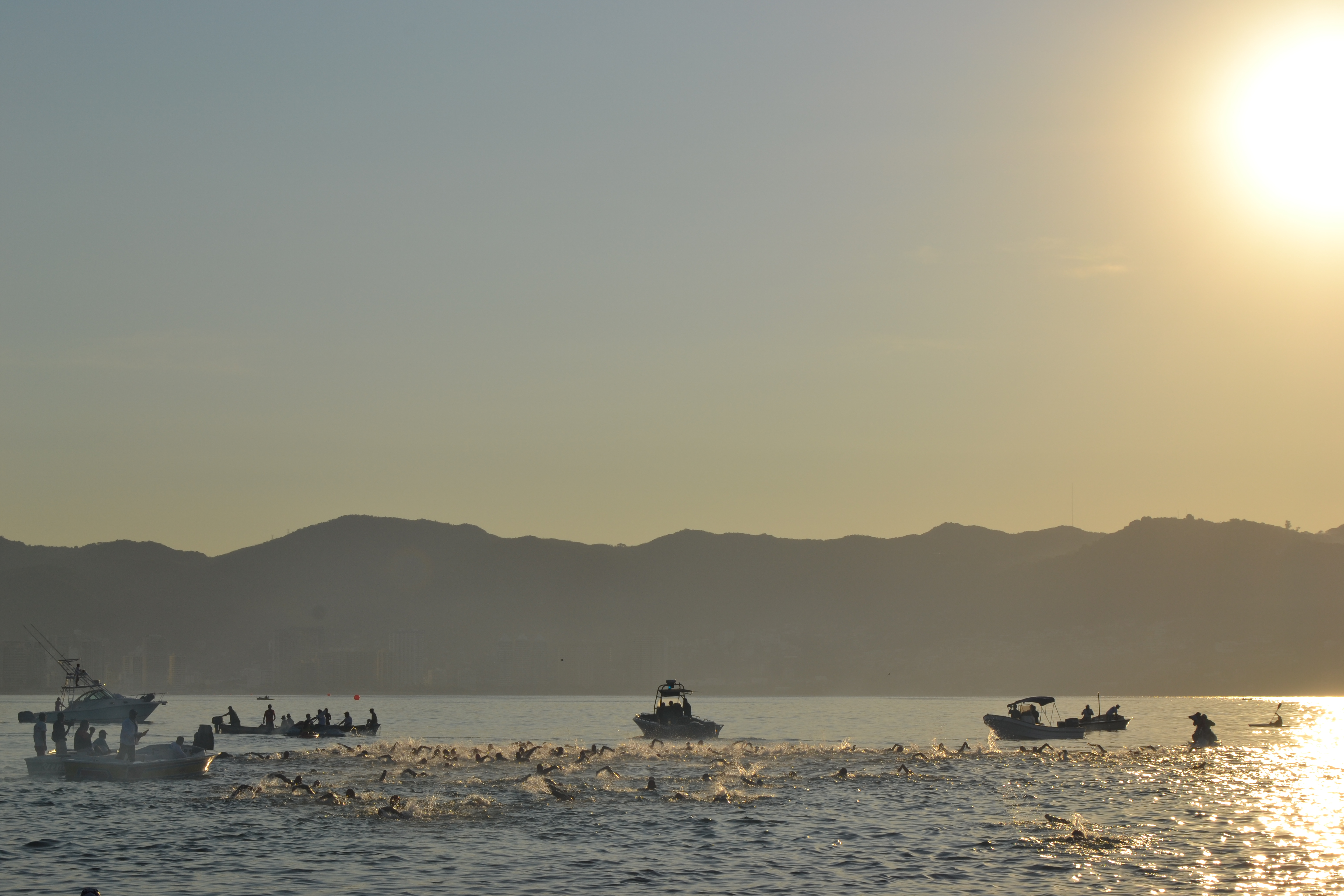 Nadadores concursando en la categoría de 5 km en mar abierto.